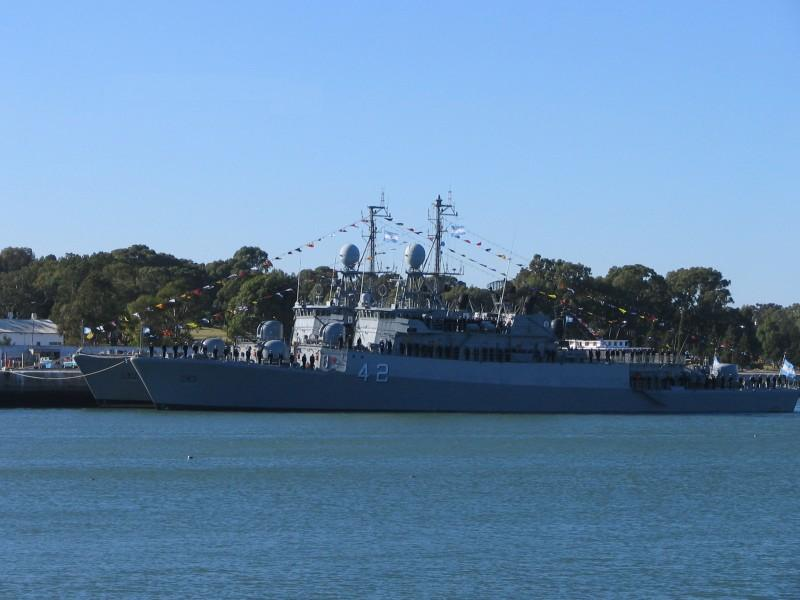 Corbettes Meko 140